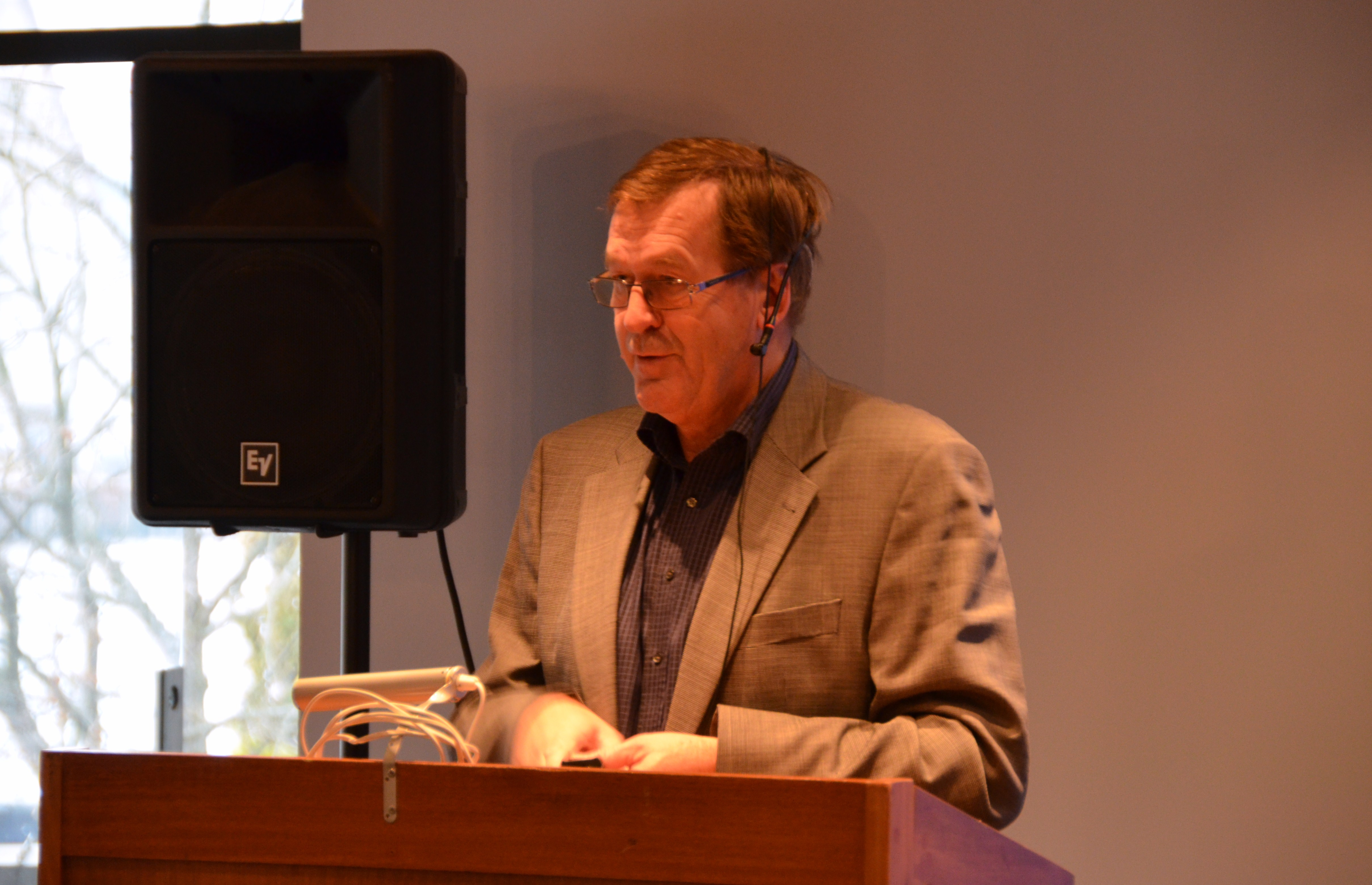 Gruppeveilder Finn Tallakstad fra KS, tidligere mangeårig ordfører i Siljan kommune